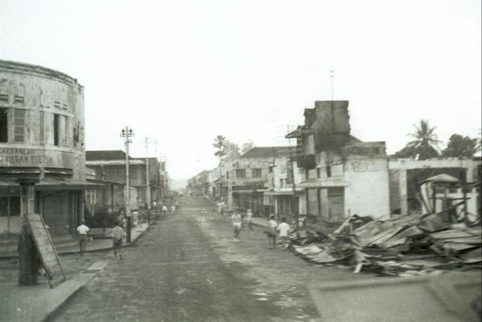 negatief. Straatgezicht in een vernielde stad, tijdens de eerste politionele actie